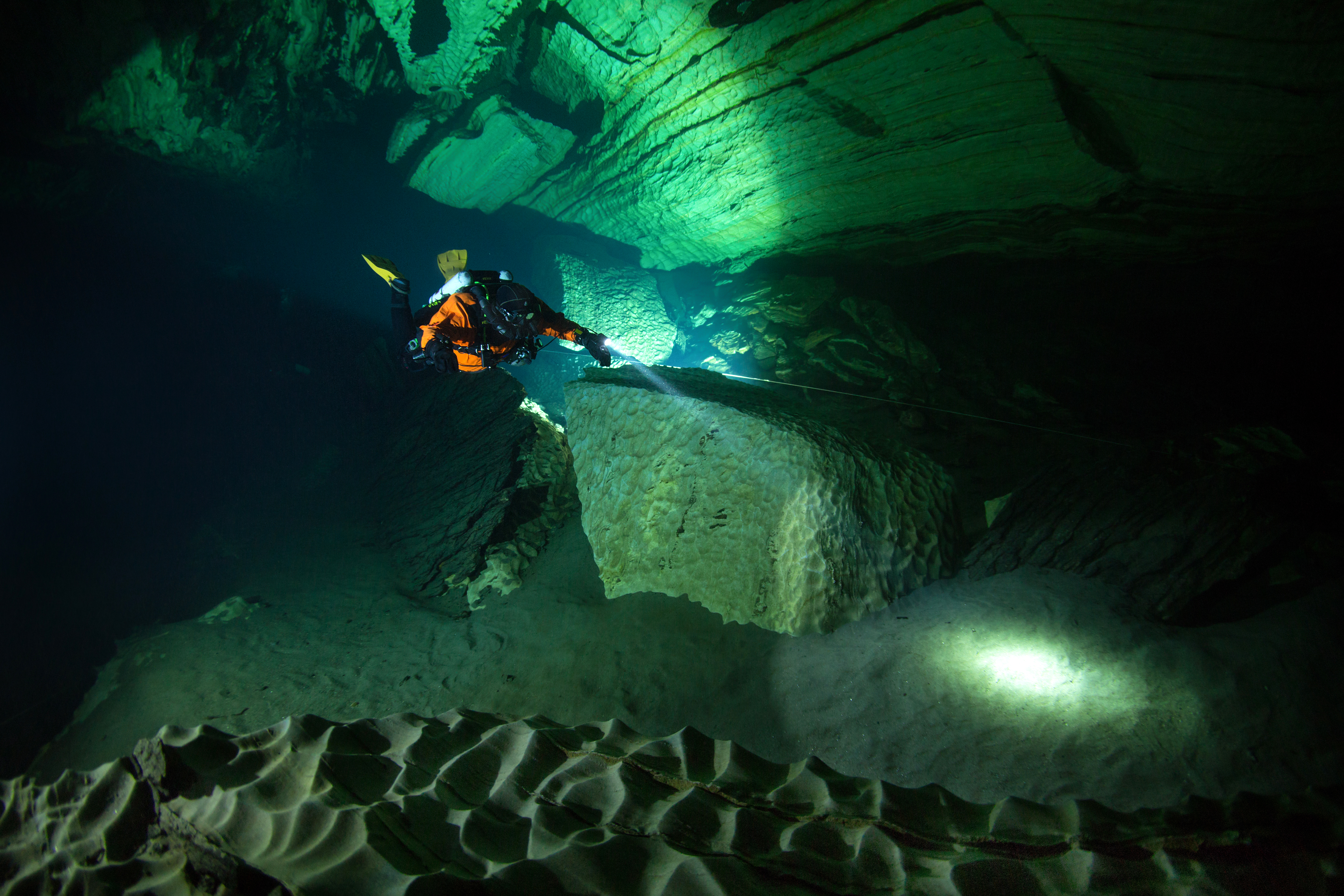 Plura er en massiv grotte med marmorpassasjer som strekker seg 2,6km inn i fjellet. Fantastisk sikt under vann. Jani Santala modell, Pekka Tuuri forograf.